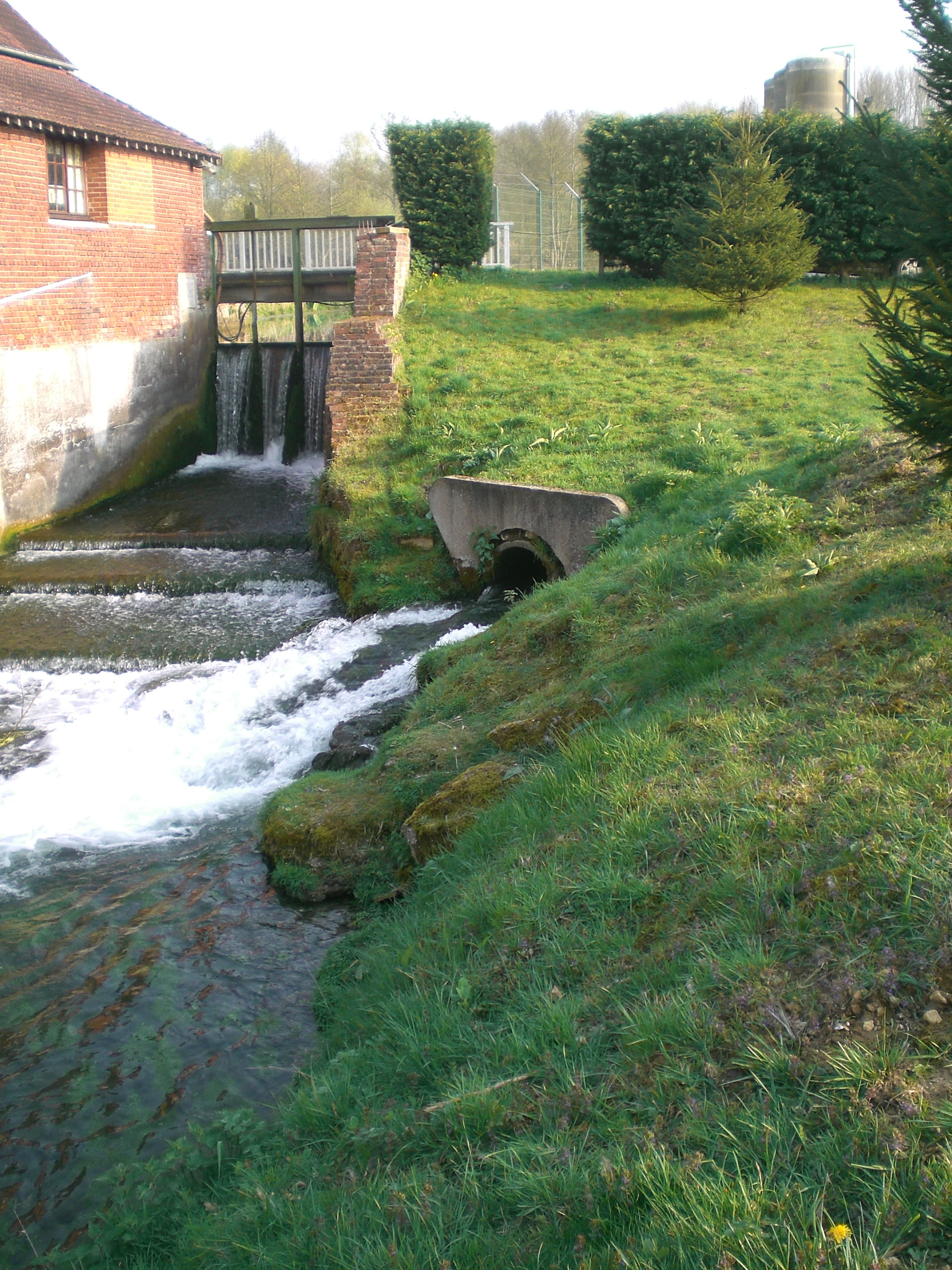 l'Ancre à Miraumont rue du moulin et à côté de la pisciculture, dans le canton d'Albert